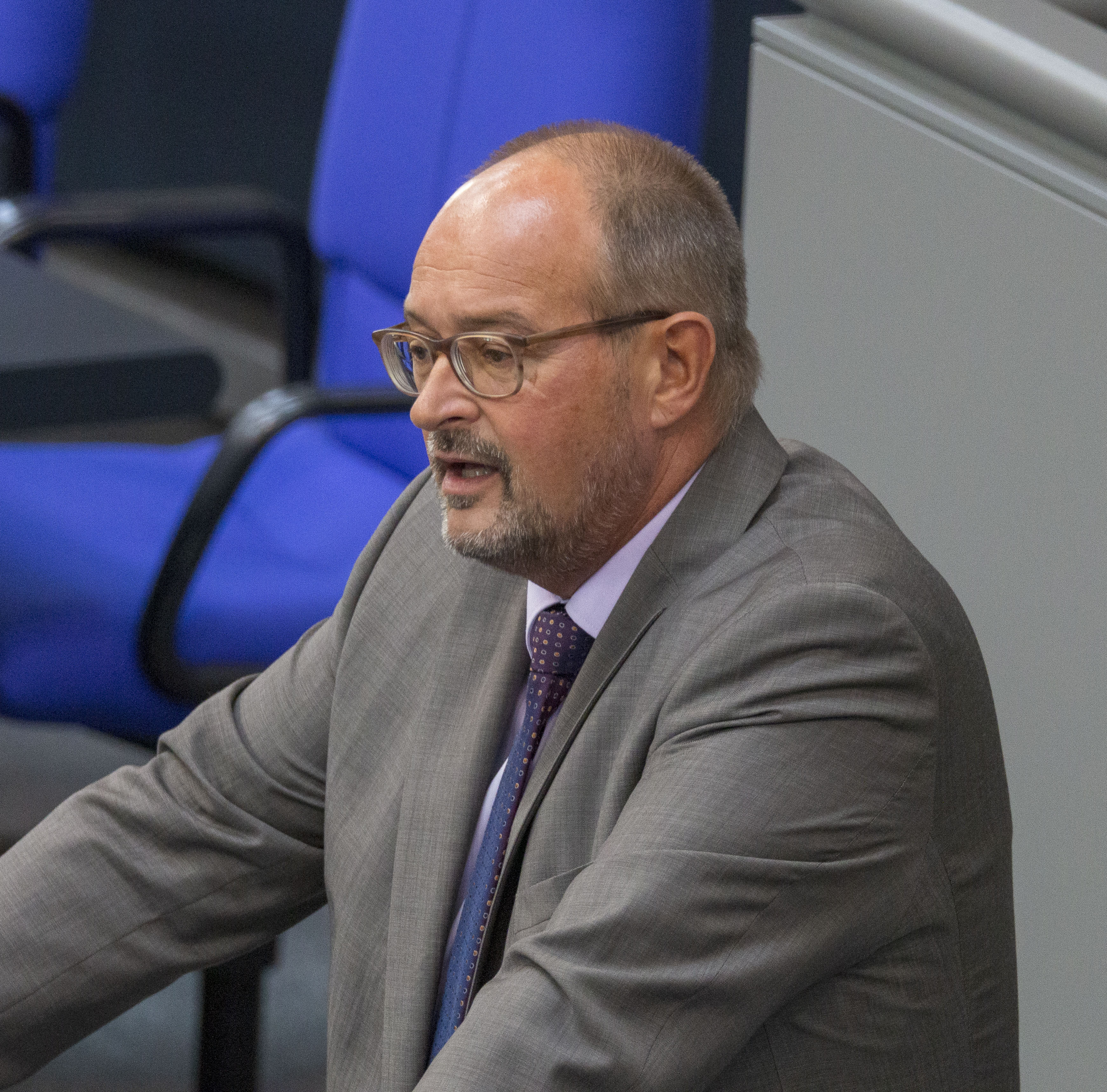 Uwe Witt, Mitglied des Deutschen Bundestages, während einer Plenarsitzung am 2. Juli 2020 in Berlin.